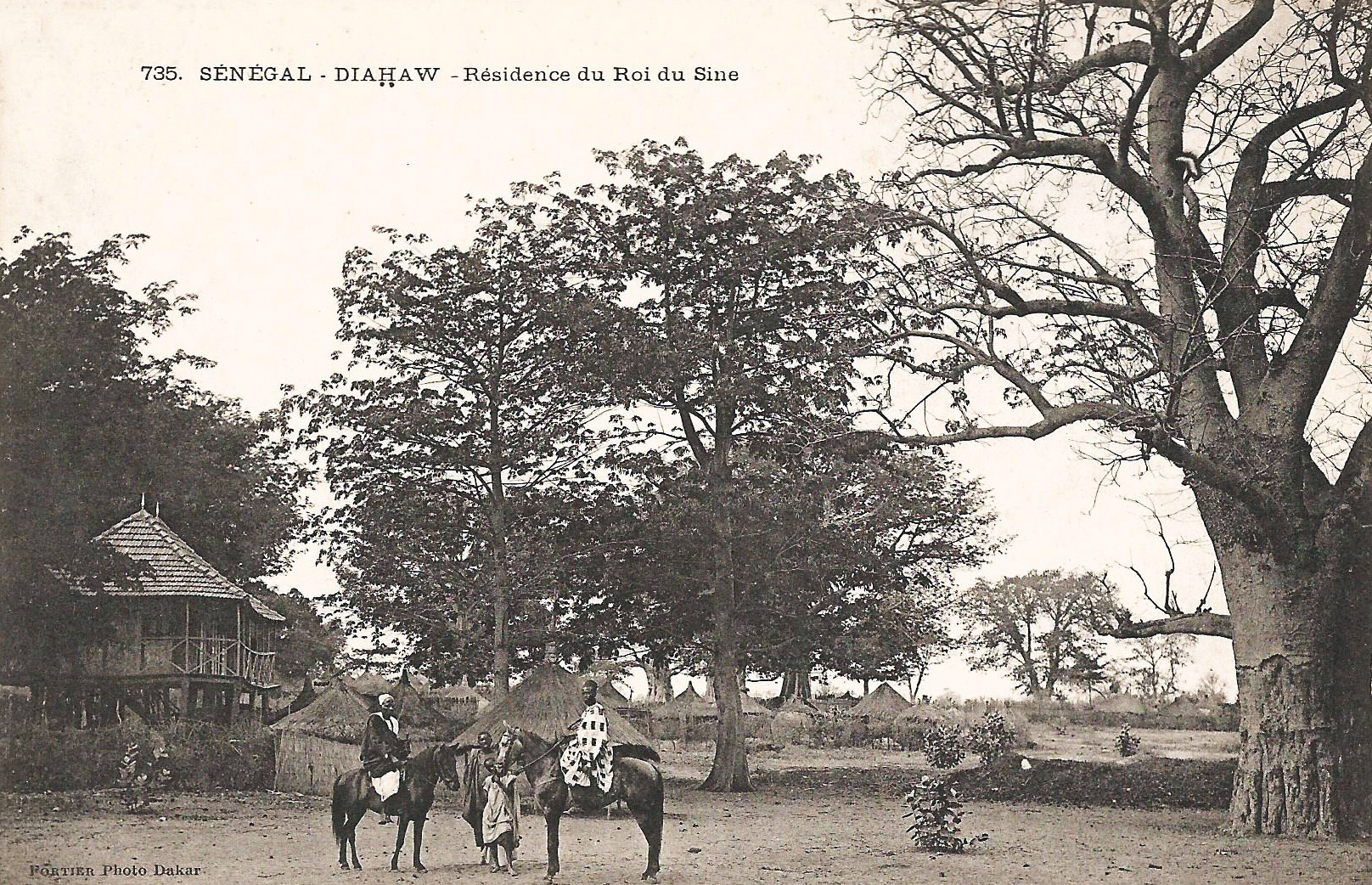 François-Edmond Fortier, Diahaw. Résidence du roi du Sine. Afrique Occidentale - Sénégal.